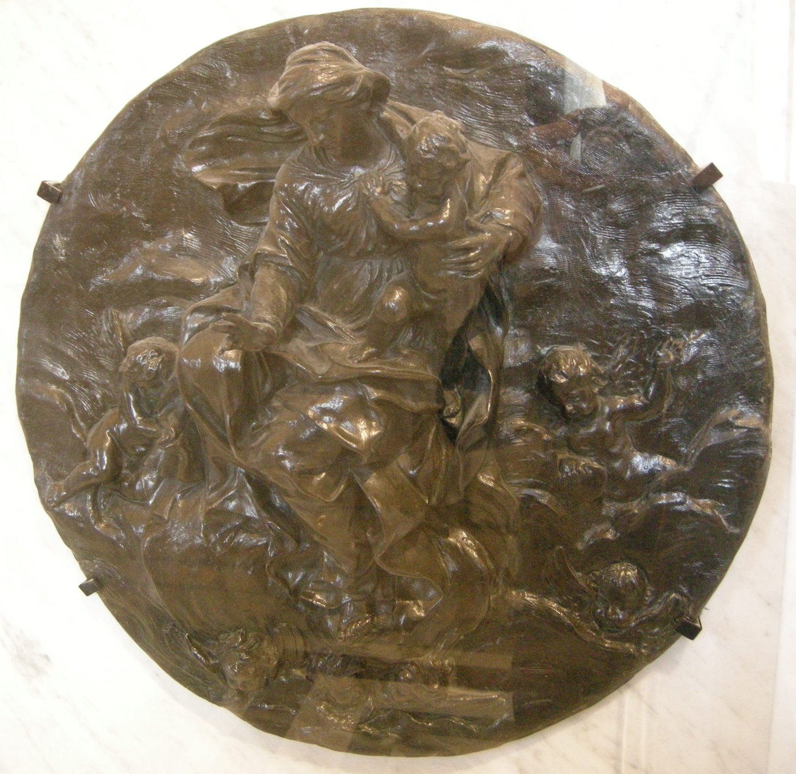 Alessandro algardi, la vergine e il bambino circodati da angeli.JPG